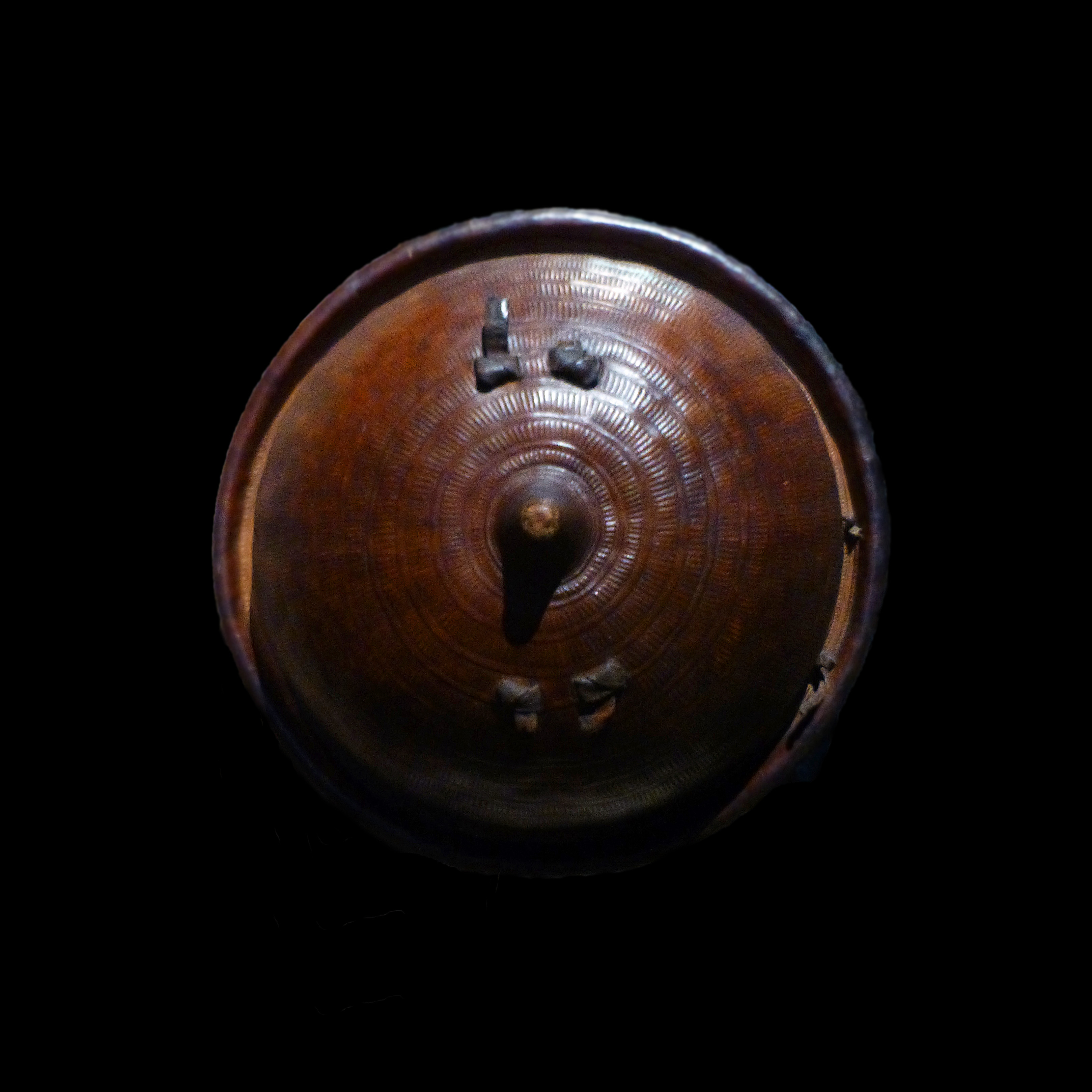 Bouclier Tulama (Oromo). Ethiopie, XXe siècle. Cuir de buffle ou d'antilope. Lyon. Musée des Confluences